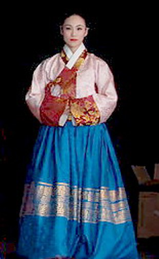 Trajes riquísimos.